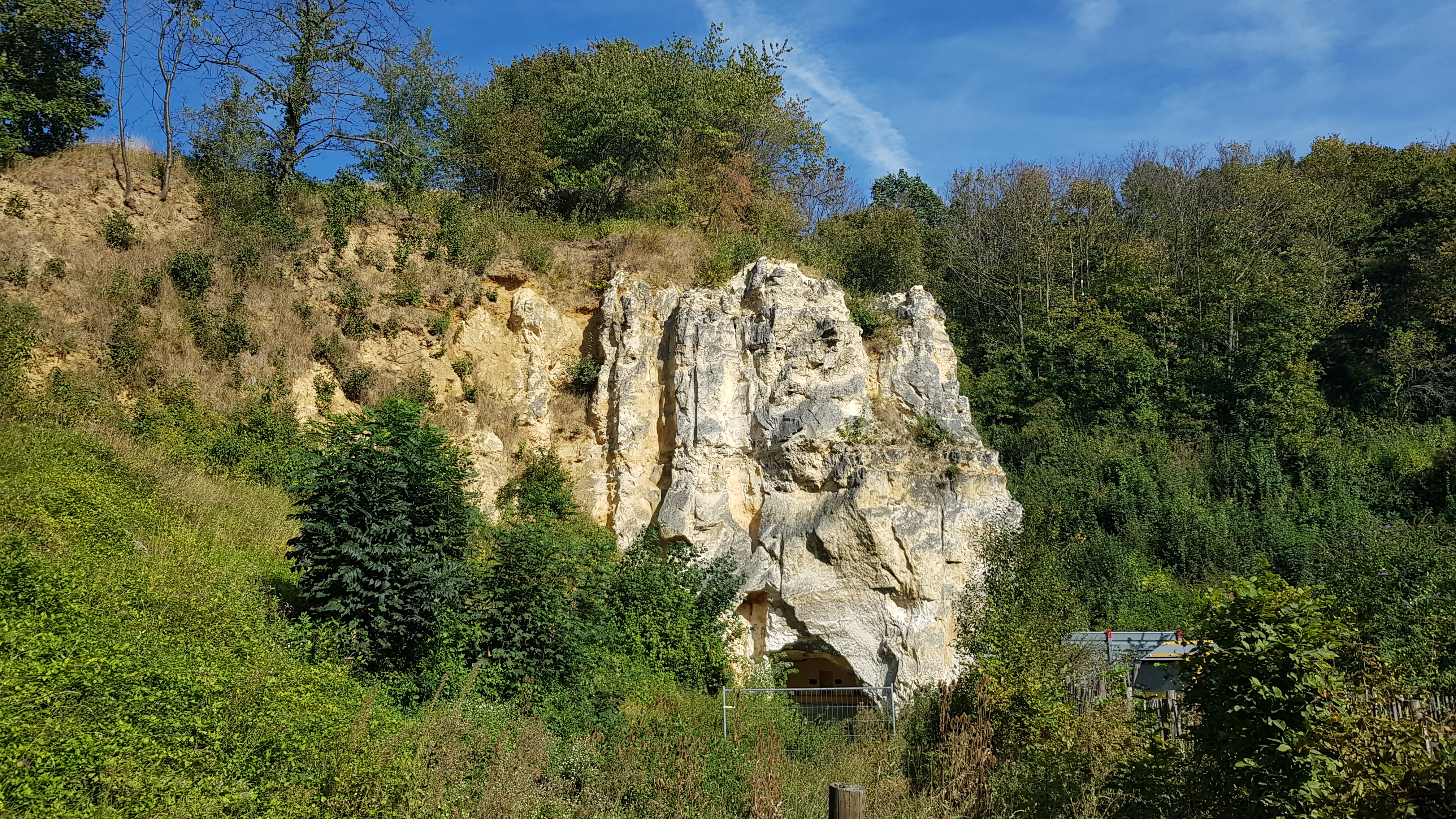 Van Schaïktunnel in Groeve van der Zwaan, Maastricht, Nederland